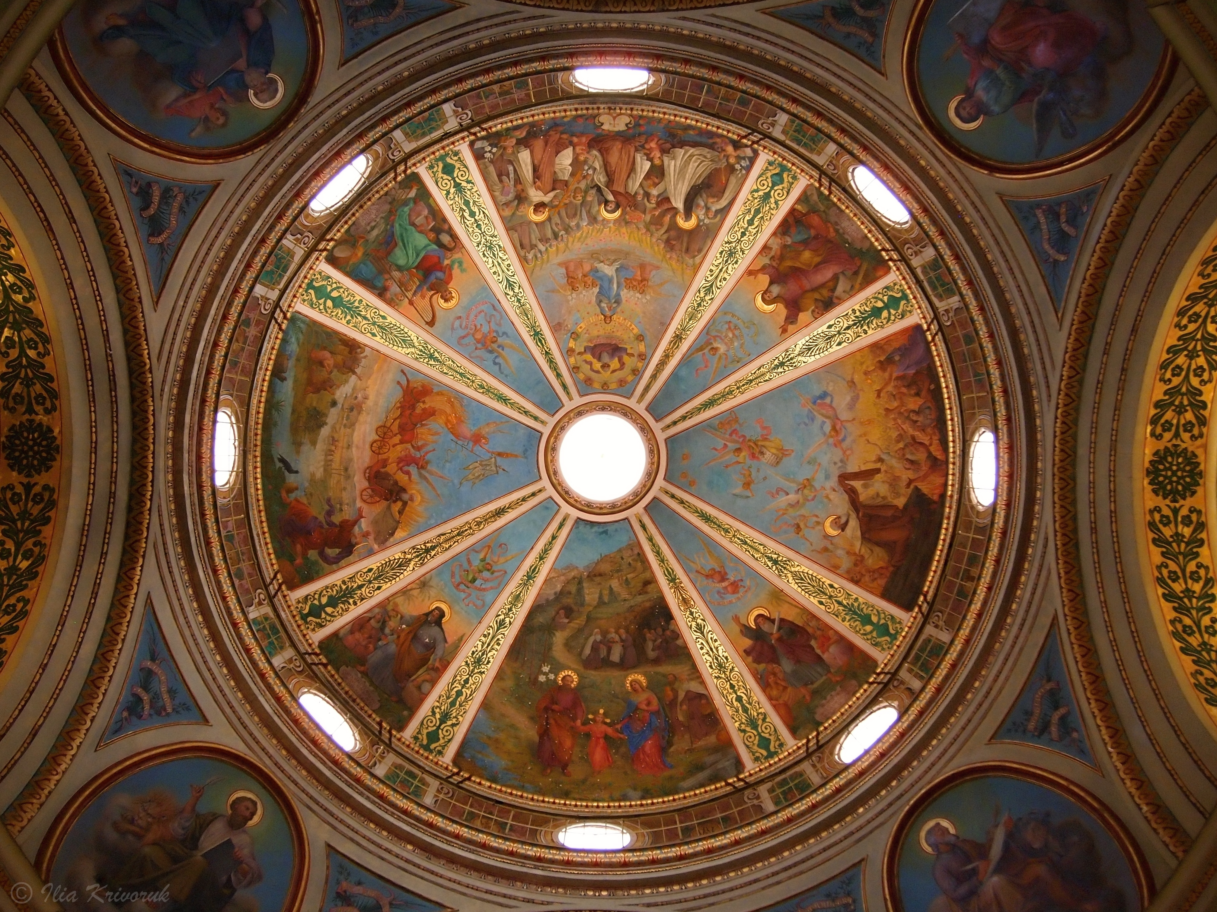 כיפה בכנסיית סטלה מאריס